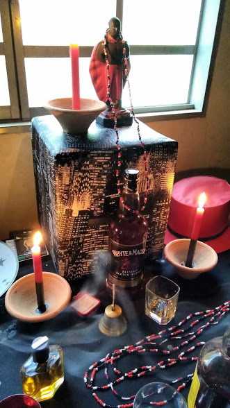 Exu Marabô